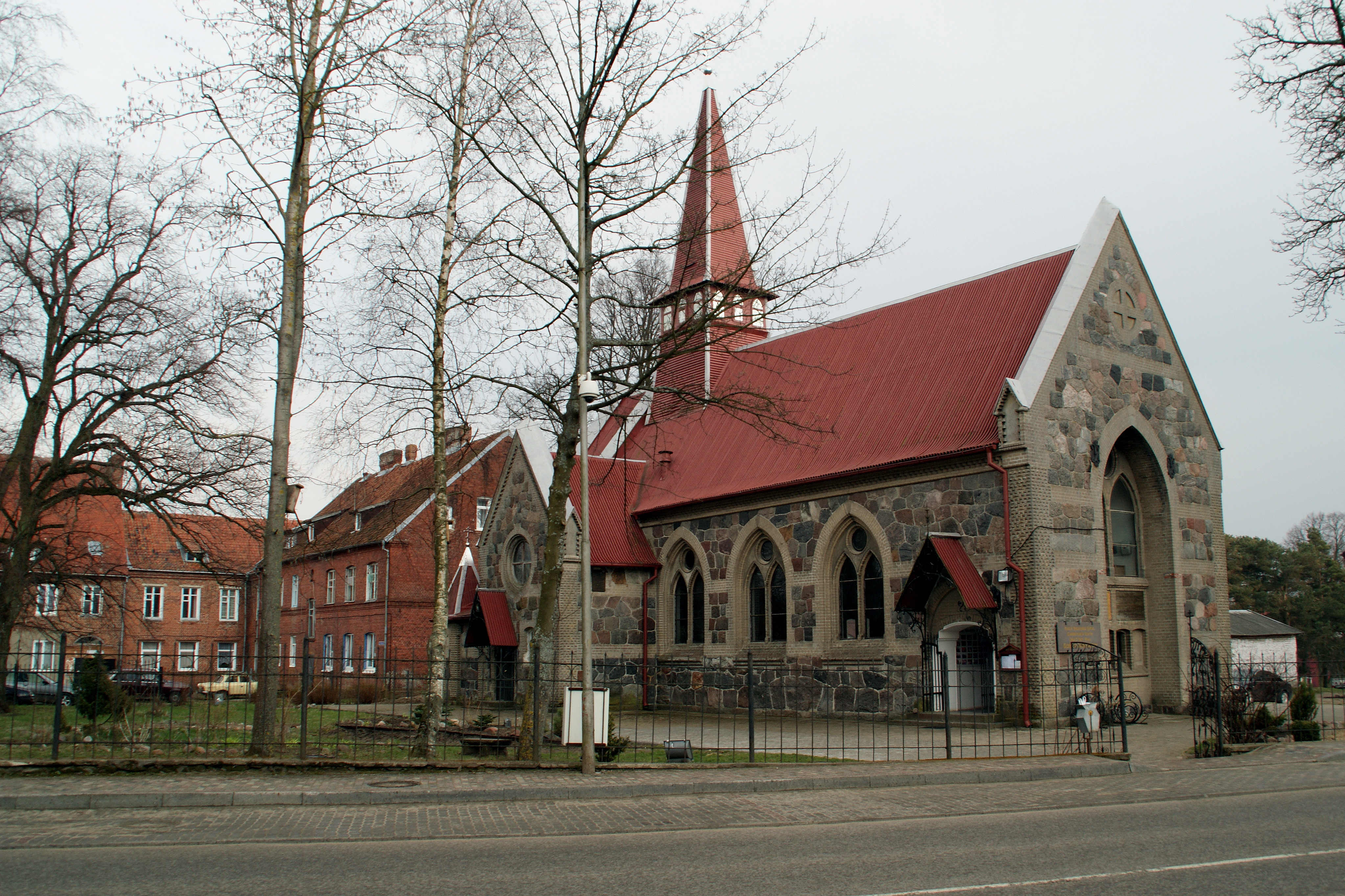 Приходская церковь: улица Советская, 67, Янтарный, Светлогорск, Калининградская область